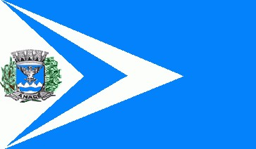 bandeira